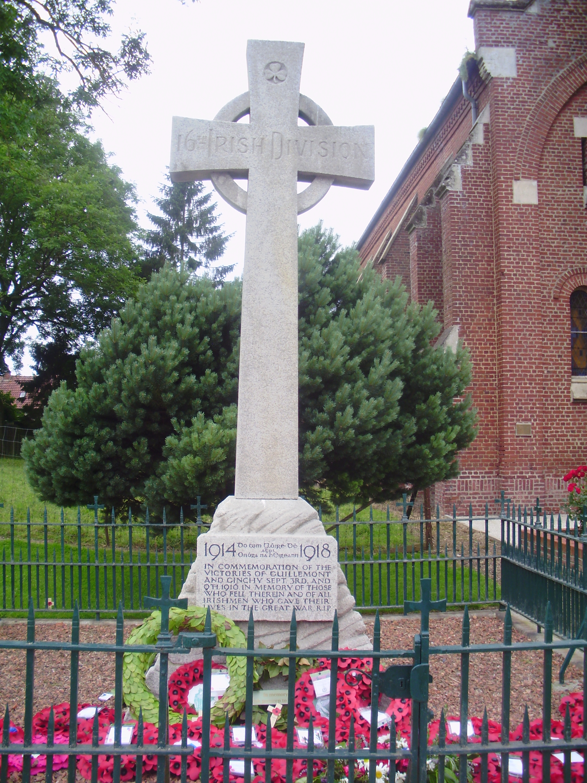 Monument à la 16e division irlandaise de Guillemont (1)